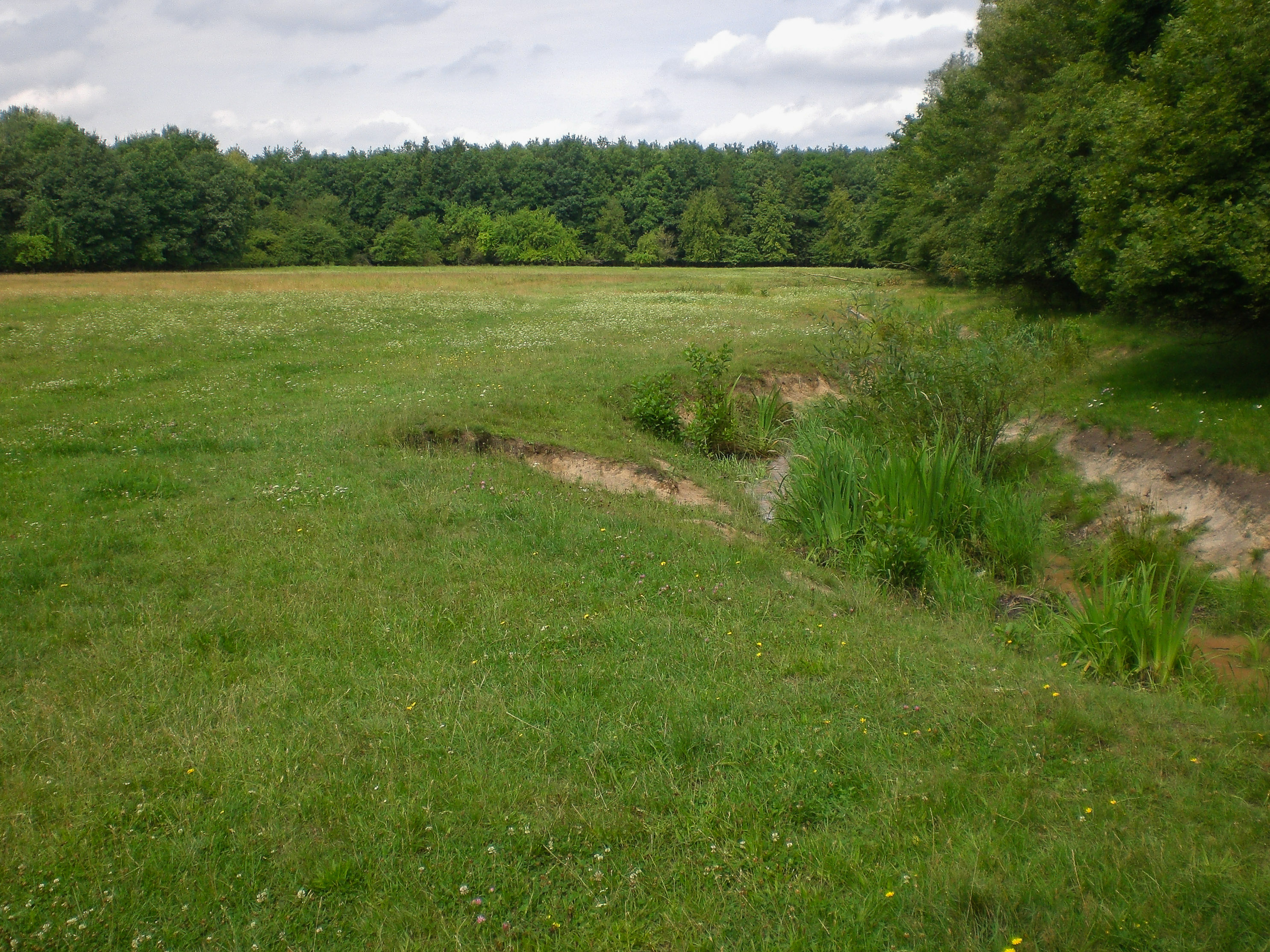 Landschaftsschutzgebiet Langwasser